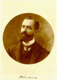 Fotografia di Angelo Scribanti da lui firmata e recante, a pie' pagina, l'indicazione: Fot: Comerio Suco, Milano